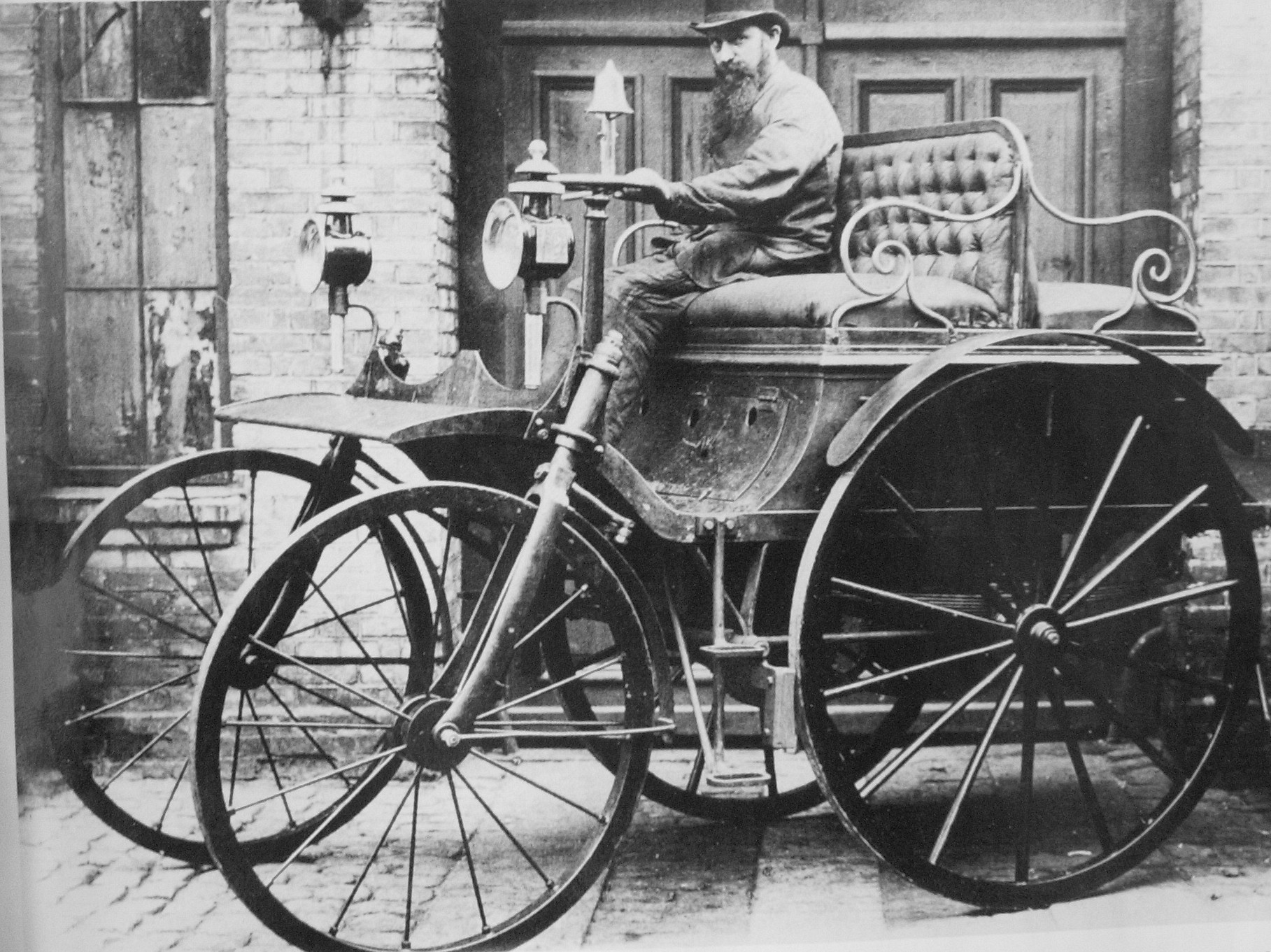 Albert Hammel, Kraftwagen von 1888, Technisches Museum Kopenhagen Afbeelding:Hammel1 1888.jpg